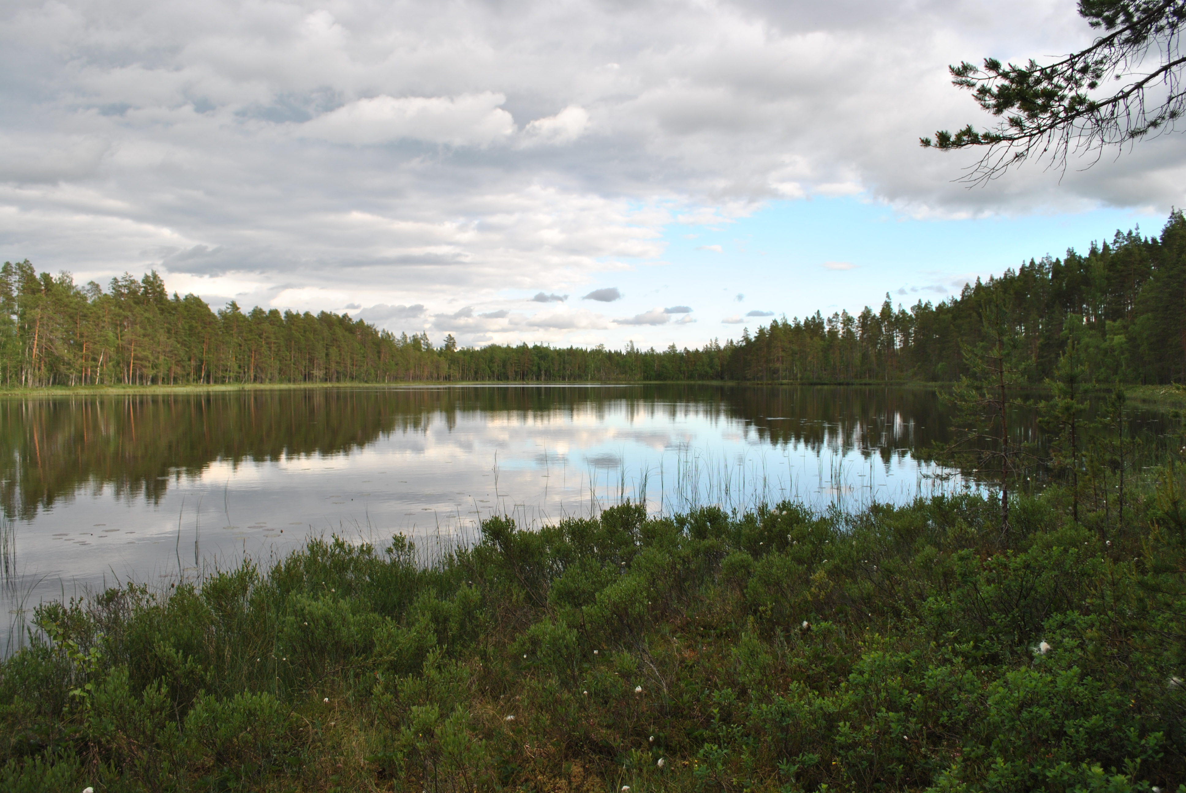 Hundtjärnen, Floda socken, Dalarna vid midsommartid 2015